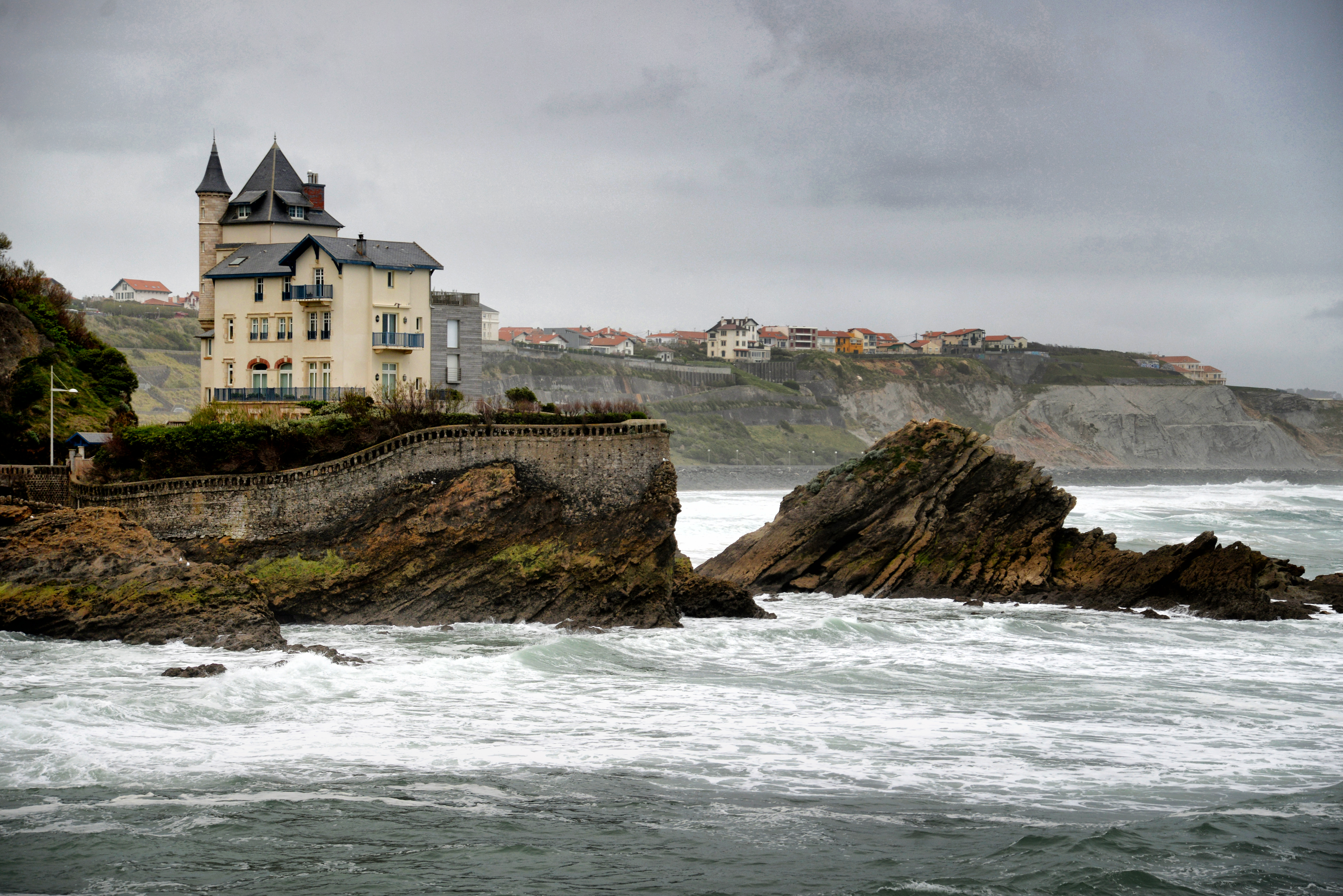 Biarritz, Pyrénées-Atlantiques (Aquitaine) - Villa Belza